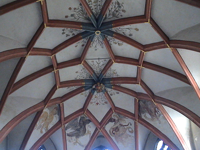 Gewölbedecke über dem Chor vor der Erneuerung.